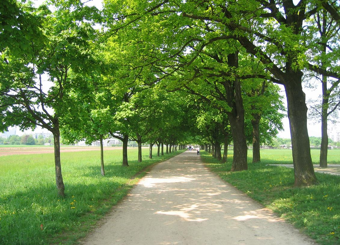 Trail of Remembrance and Comradeship (Pot spominov in tovarištva) - Ljubljana Tree lane